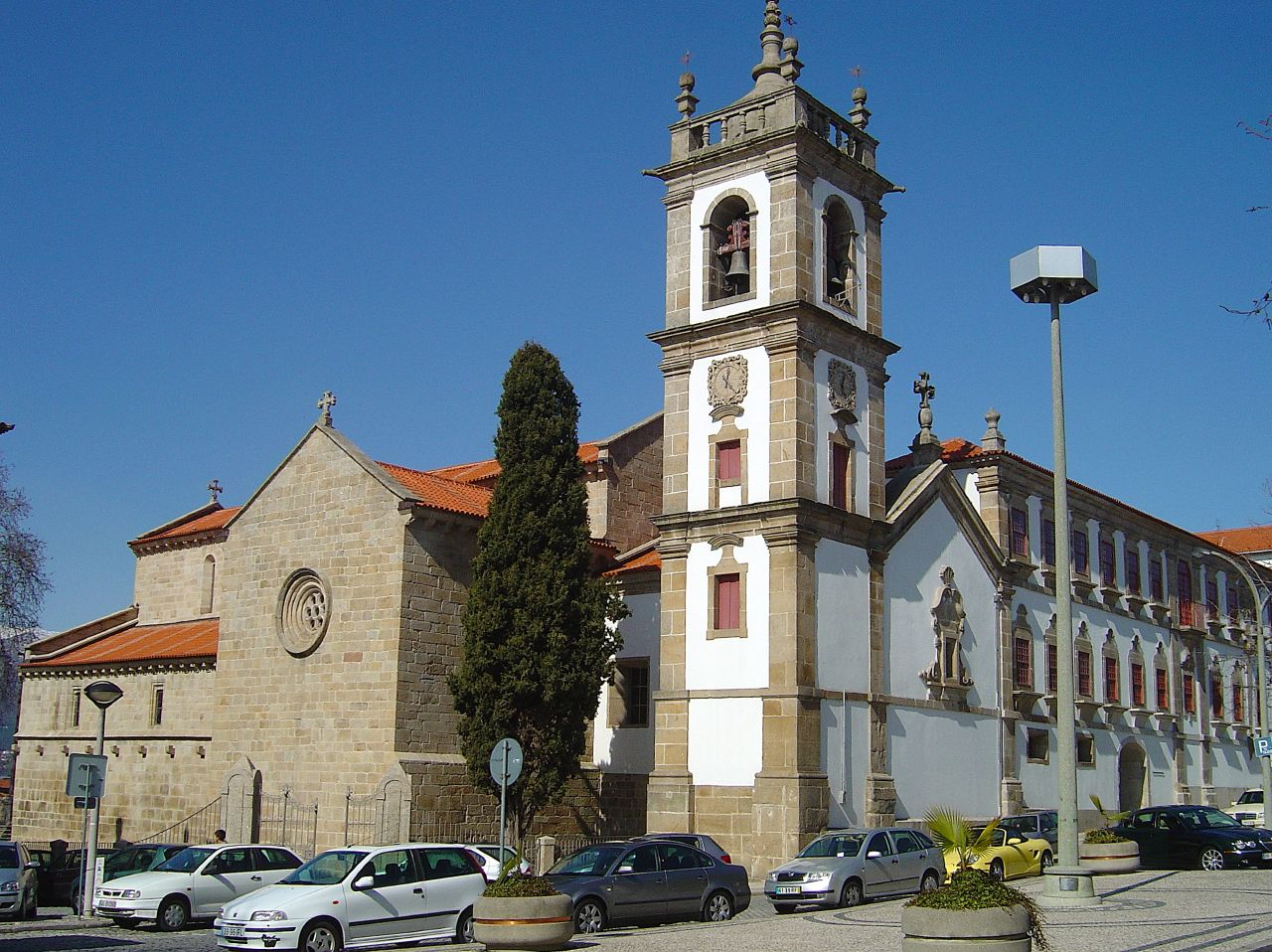 Igreja Matriz de Vila Real